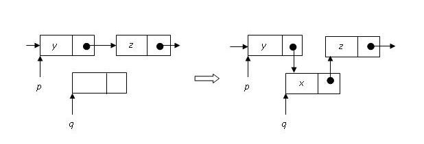 Umetanje u listu